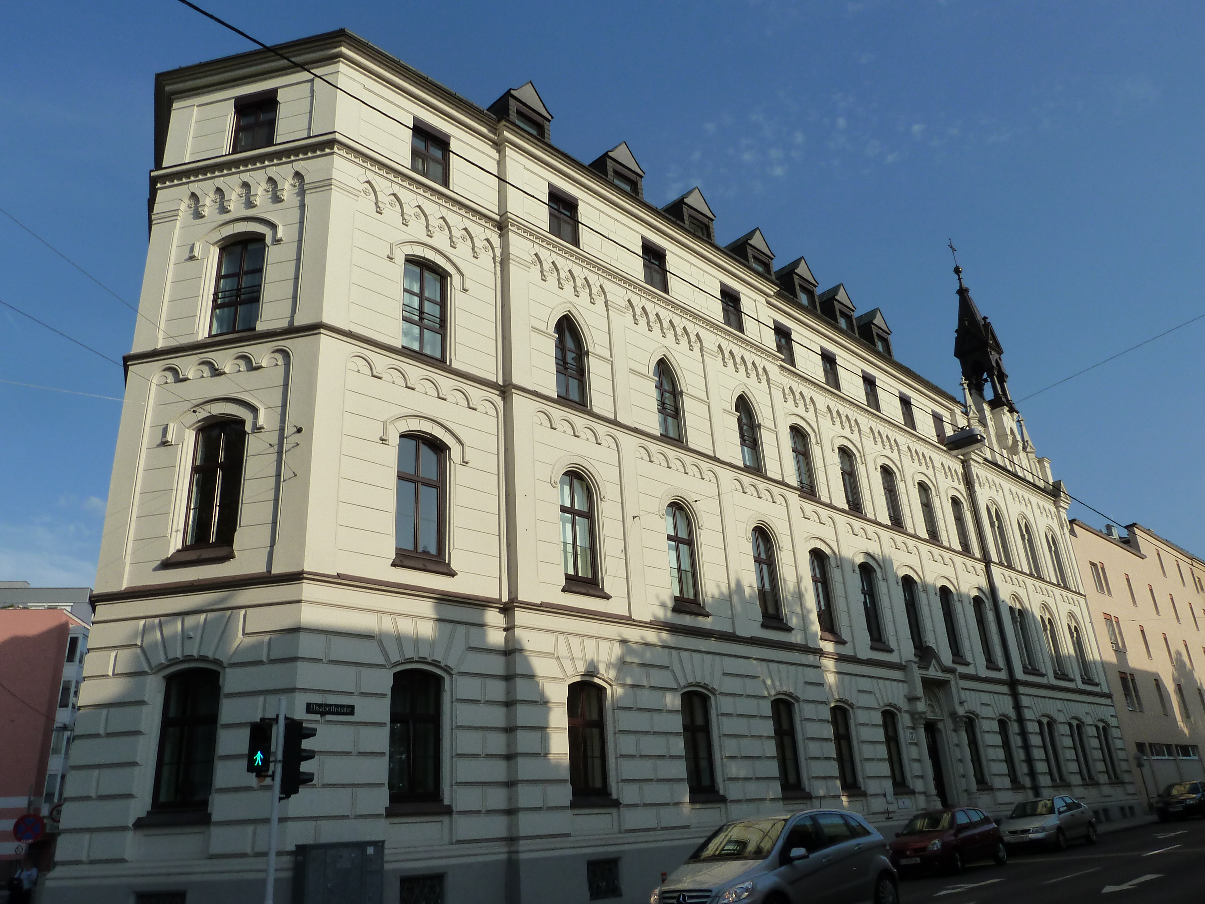 Haus Karl Borromäus, Seniorenheim